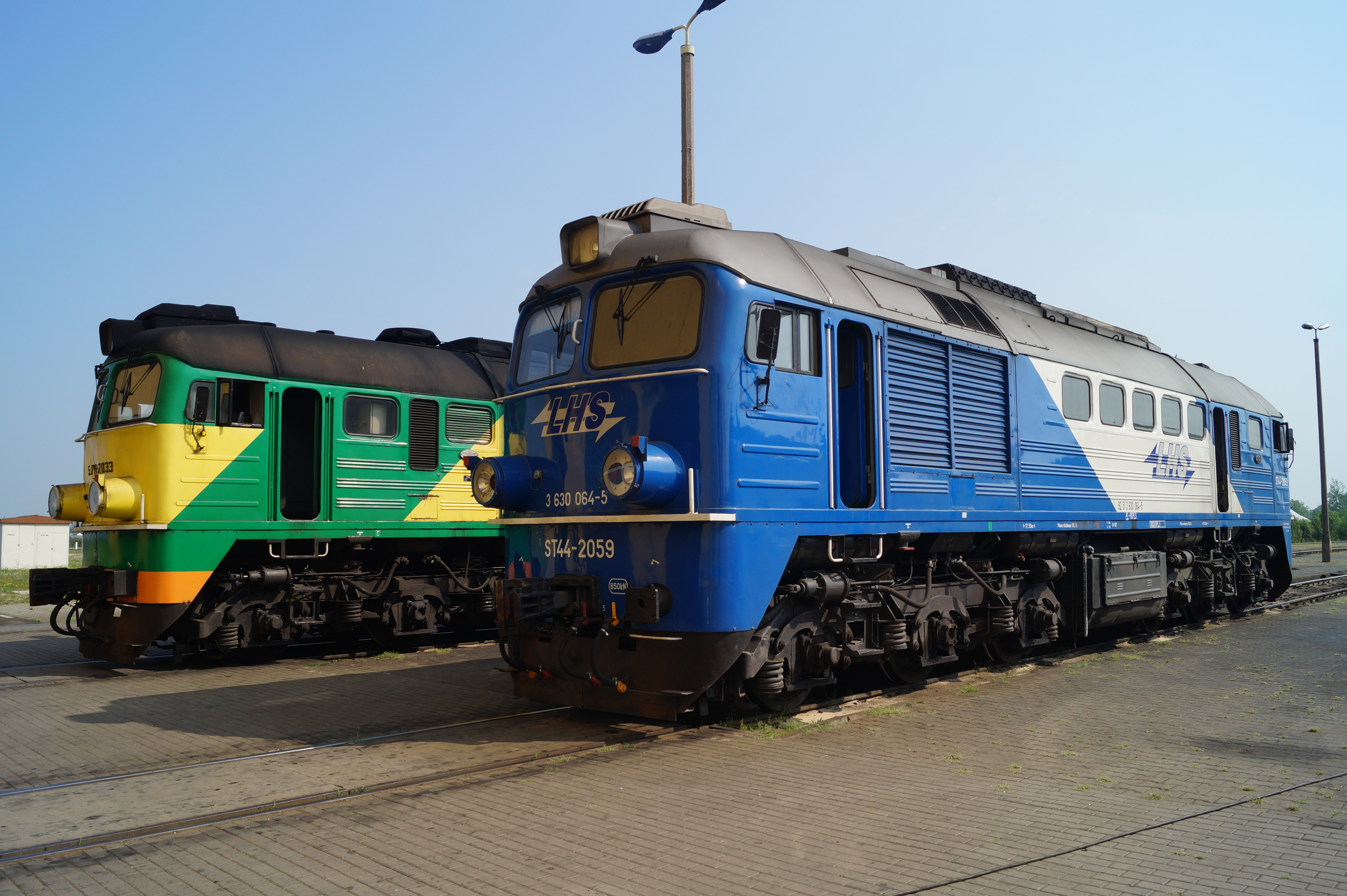 Dwa schematy malowania - stary (żółtozielony) i nowy (niebiesko-biały) lokomotyw ST44 należących do PKP LHS